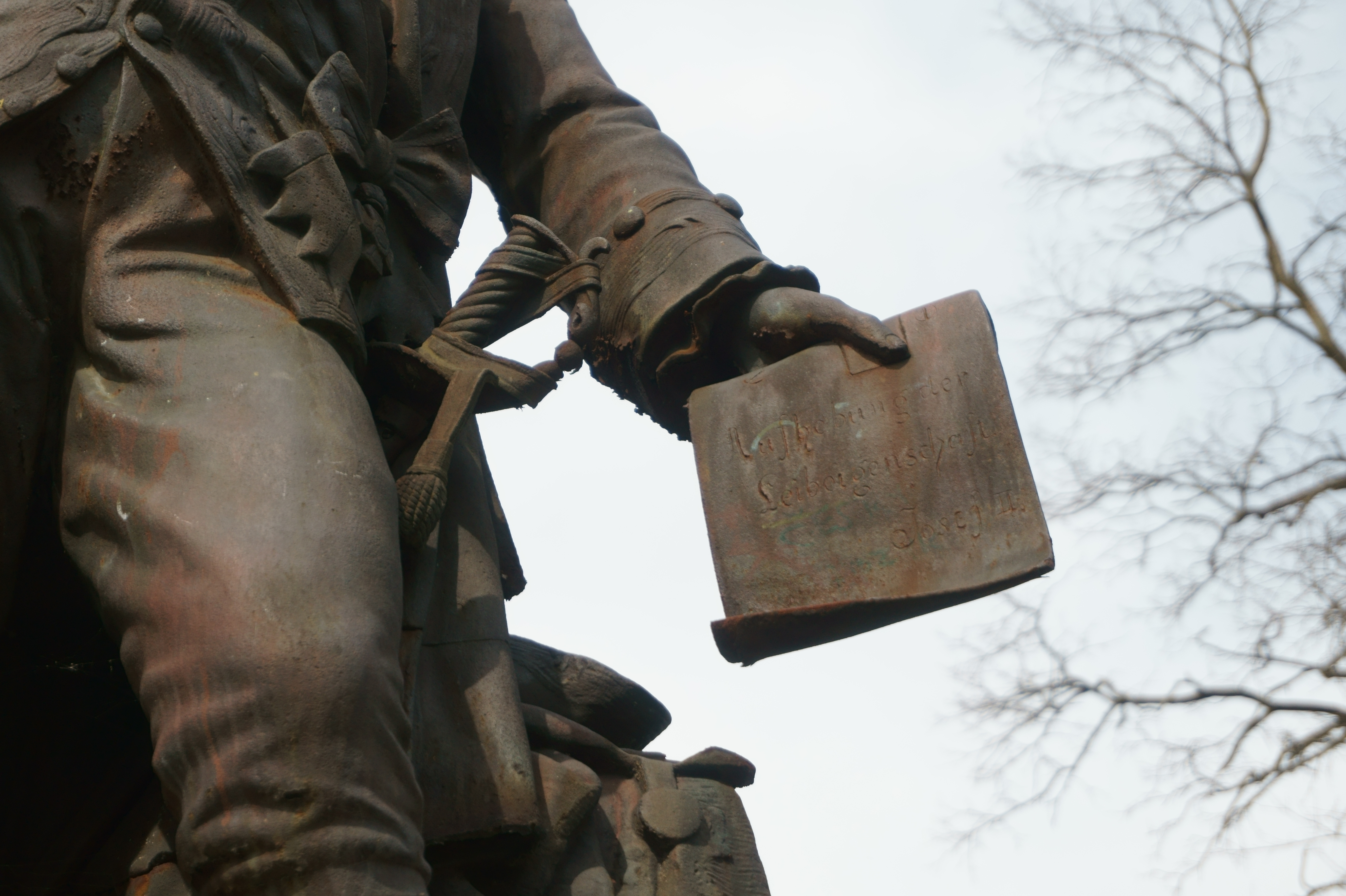 Stráž pod Ralskem - pomník Josefa II., detail patentu (zrušení nevolnictví): Aufhebung der Leibeigenschaft // Joseph II.